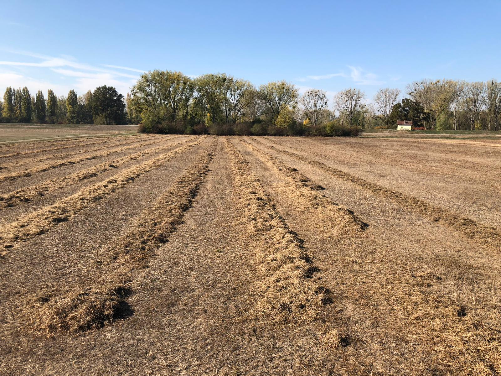 Maatgut auf der Umwandlungsfläche